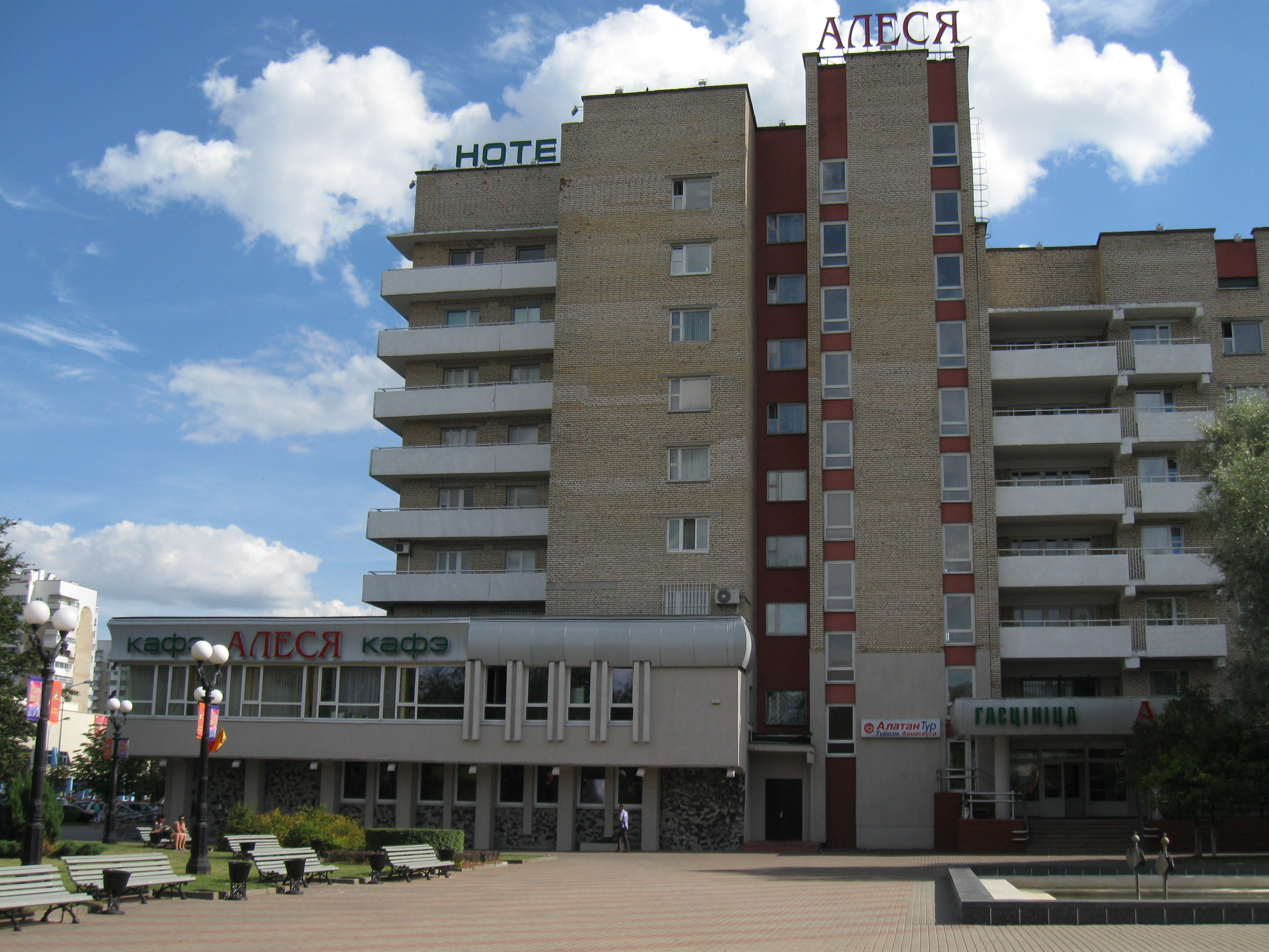 Беларуская (тарашкевіца): Салігорская гасьцініца "Алеся"